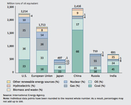 weltweiter Vergleich des Energiekomsums